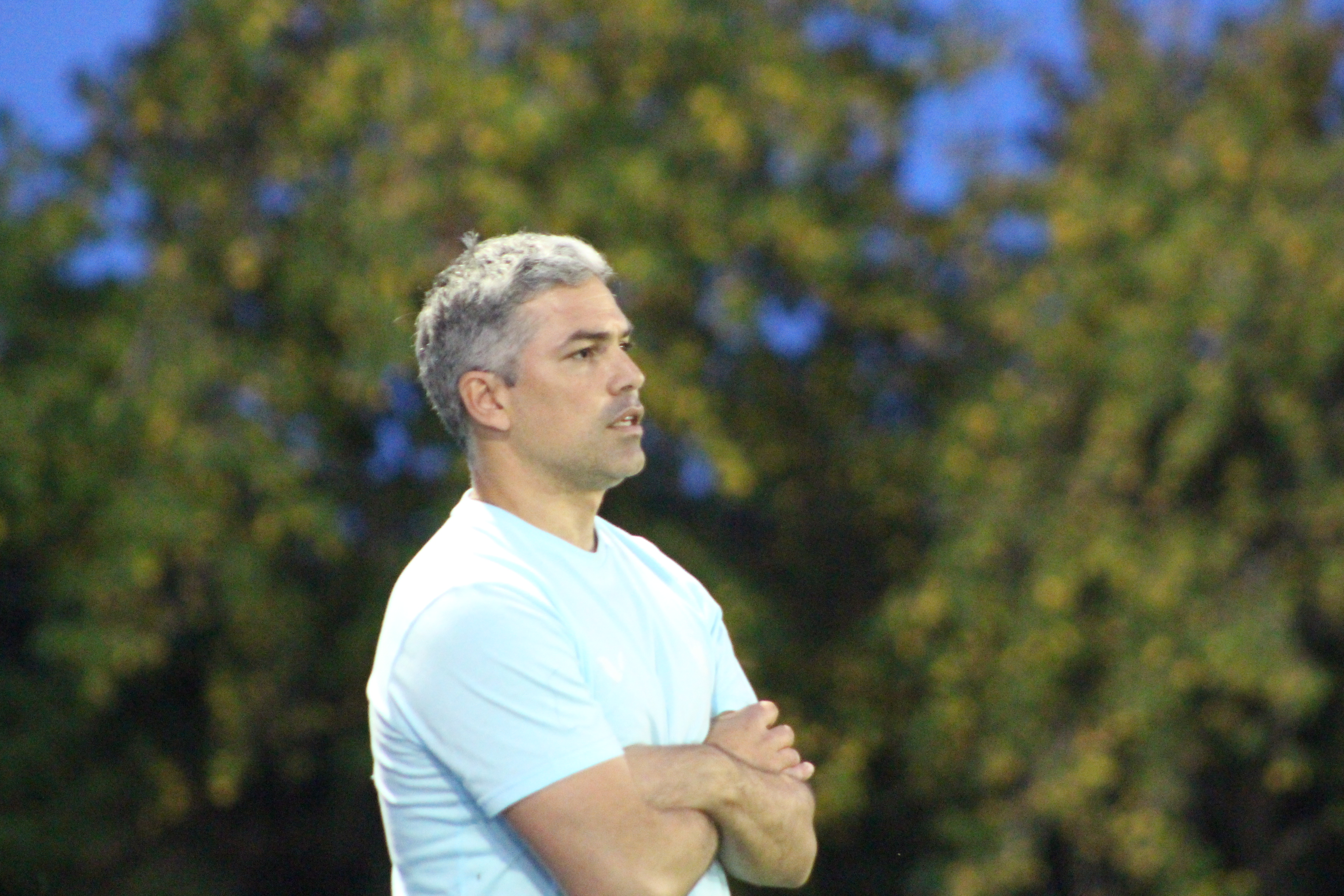 Nicolas Stigliano